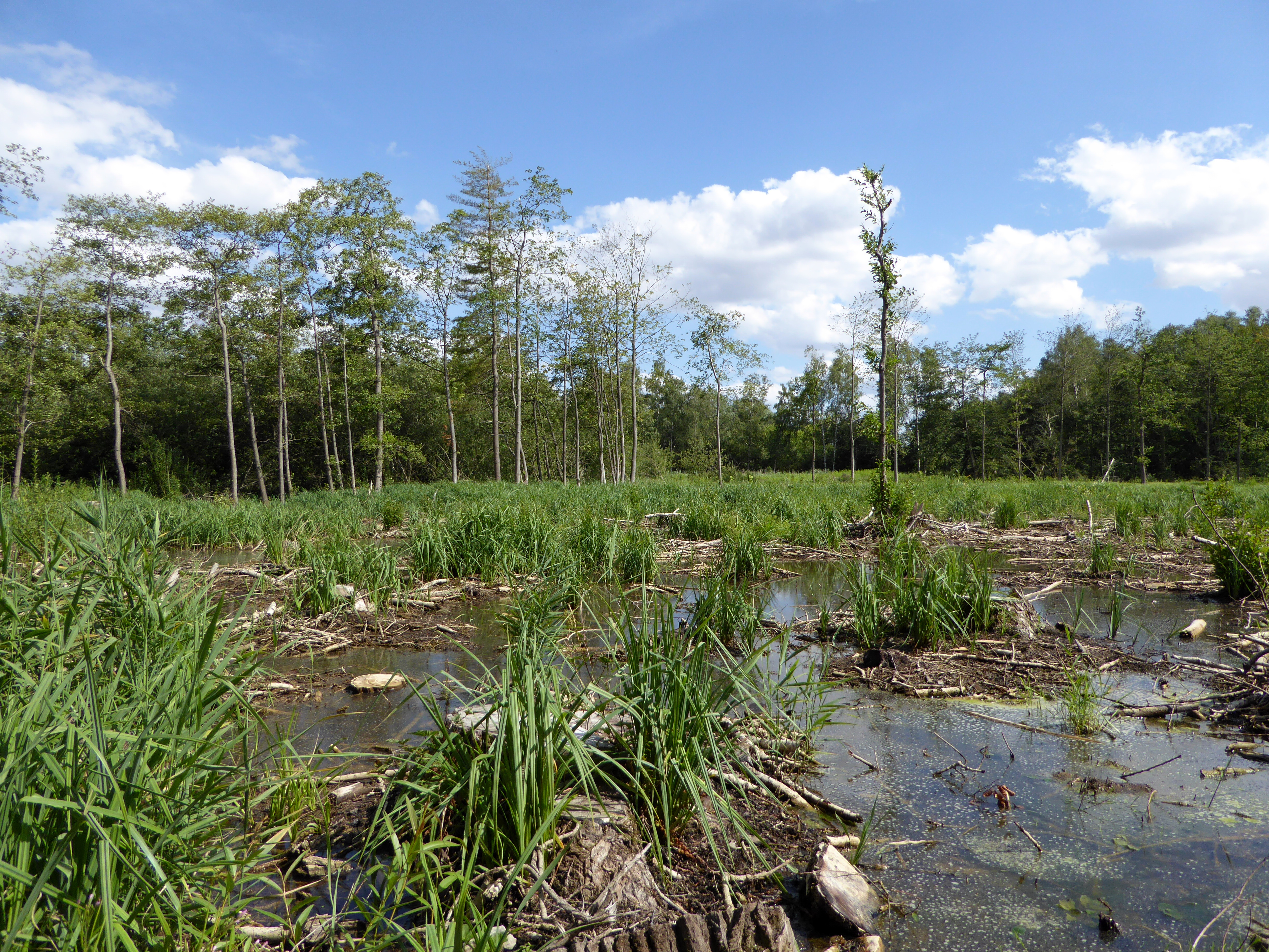 Niedermoor im Naturschutzgebiet Muckenbruch in Bad Westernkotten